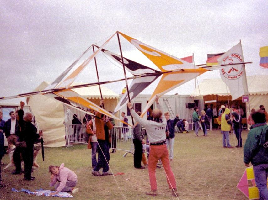 Peter Lynn portant un Tri-D box à Dieppe.